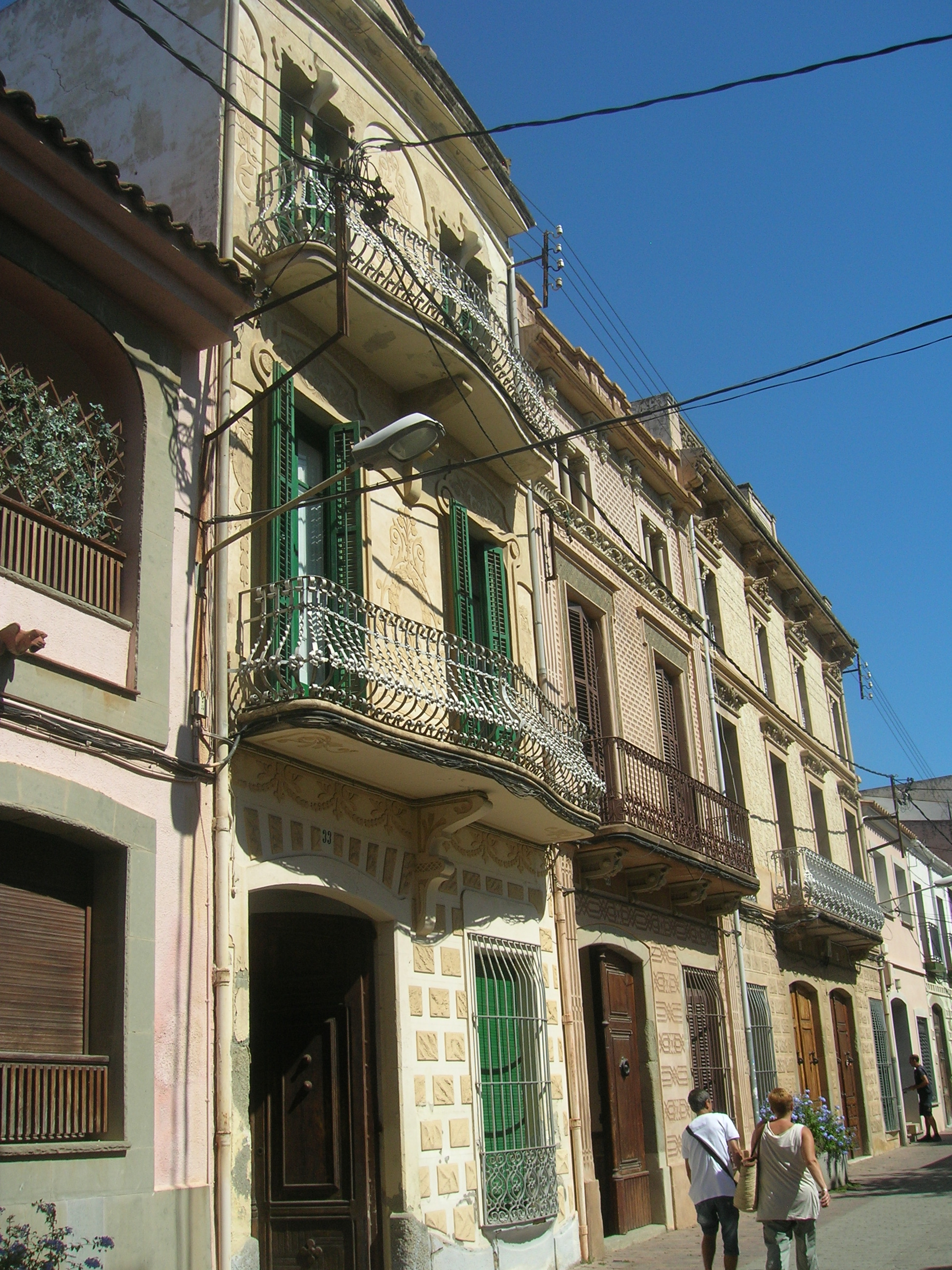 Casa al carrer Sant Roc, 33 (Vilassar de Mar)